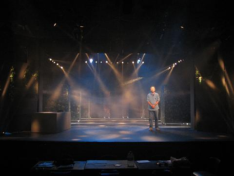 mondiart under its own light